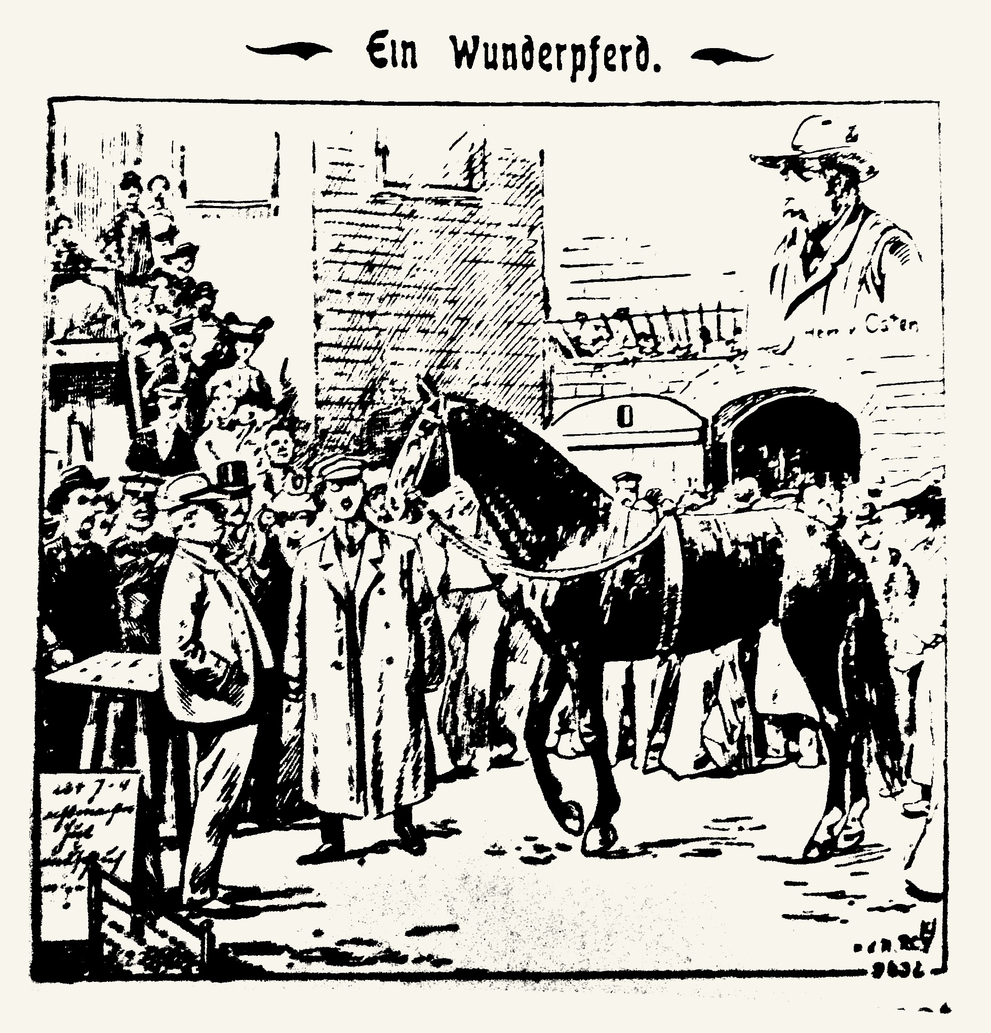 Der kluge Hans in der Berliner Morgenpost 189 vom 13. August 1904